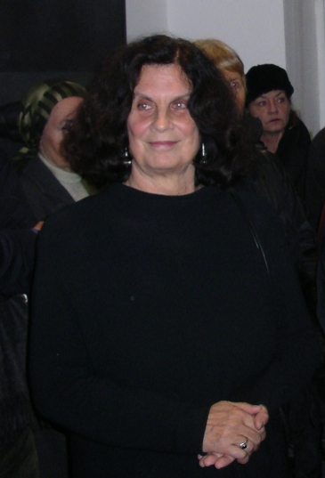 Die Malerin und Grafikerin Nuria Quevedo während einer Ausstellungseröffnung in Berlin-Friedrichshain.